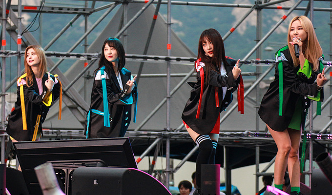 170819 도심속 봅슬레이